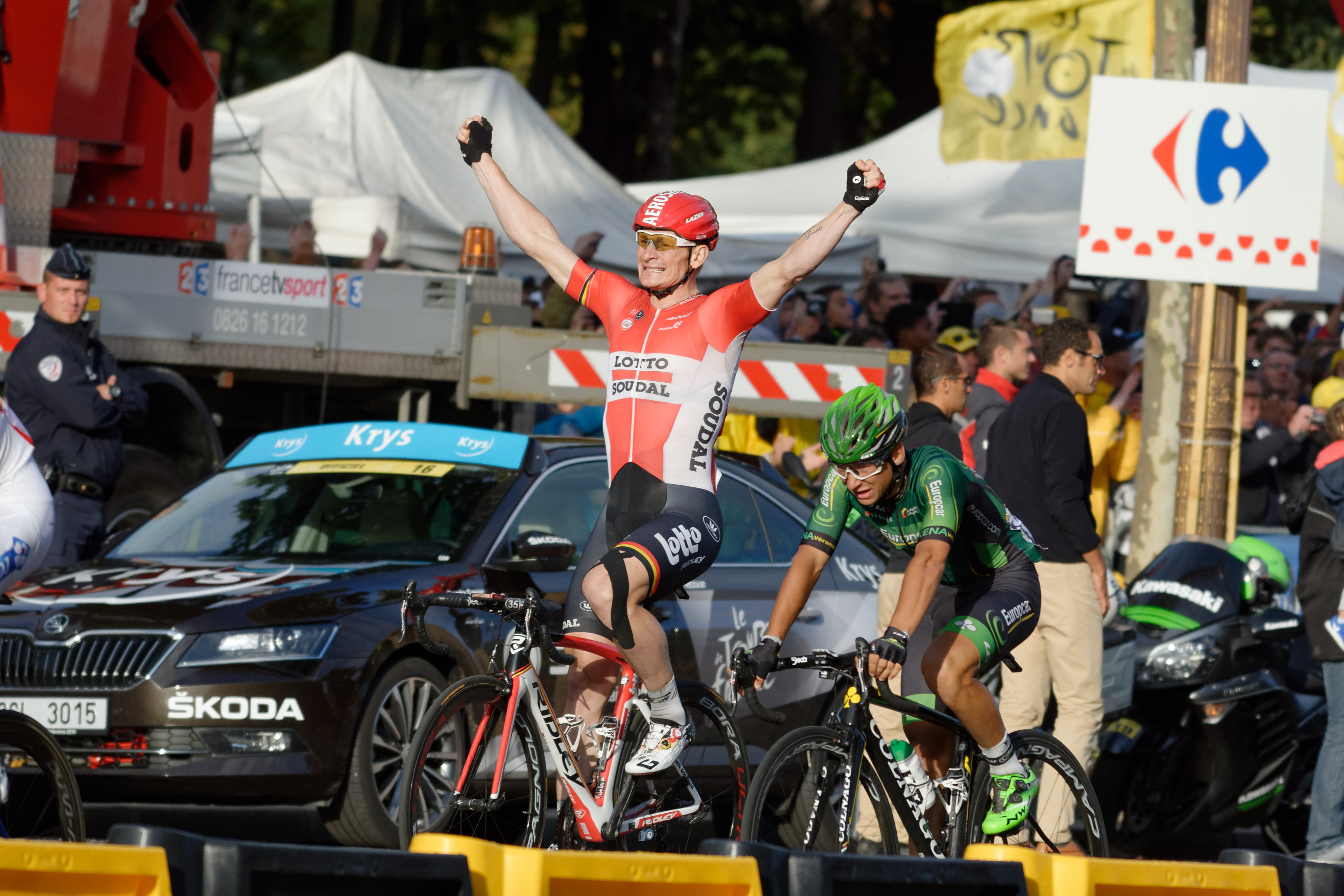 D71_3372_DxO